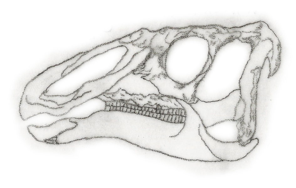 Illustration of a fossil of Lophorhothon